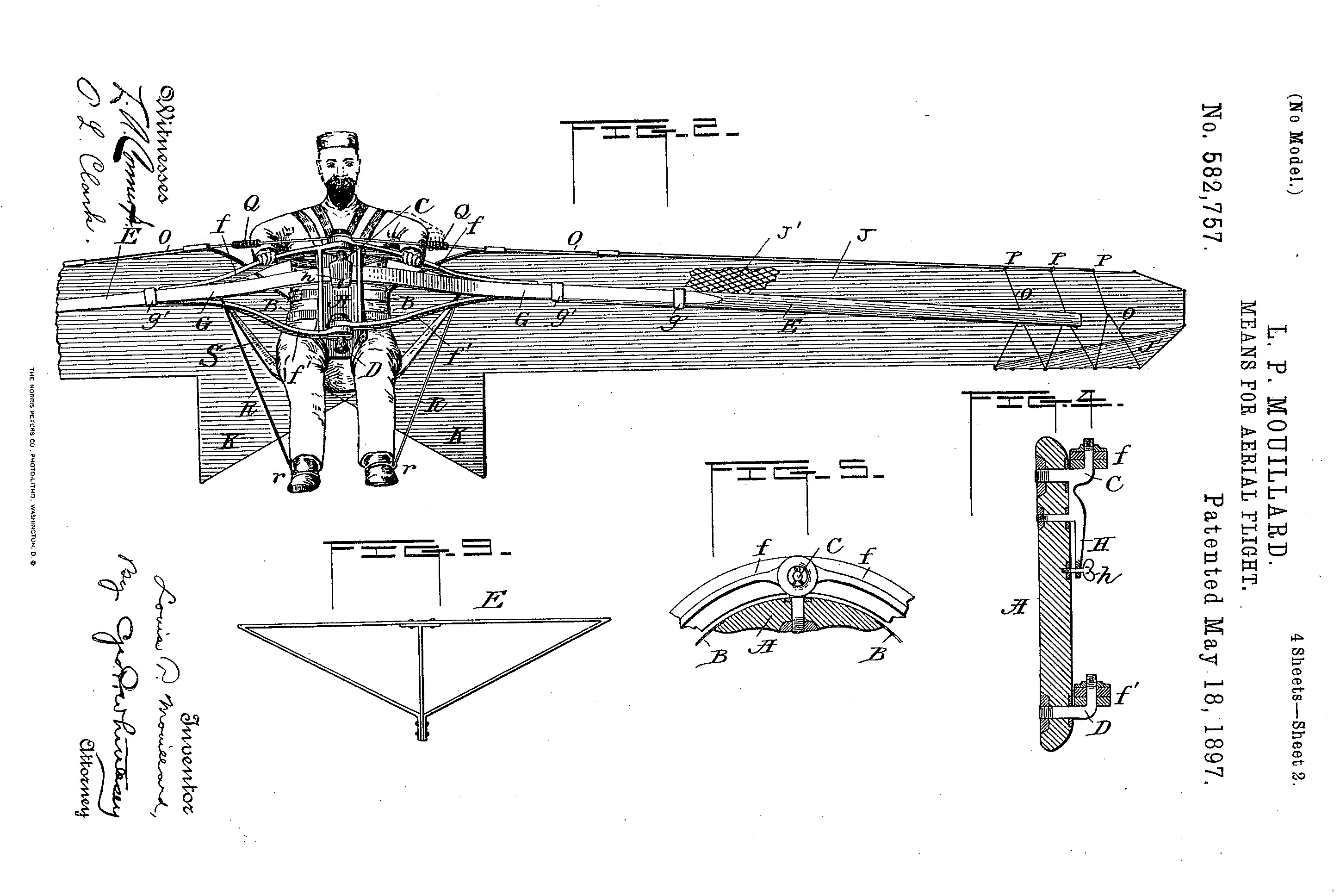 Louis Pierre Mouillard patent 1897